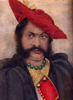 Jayaji_Rao_Scindia